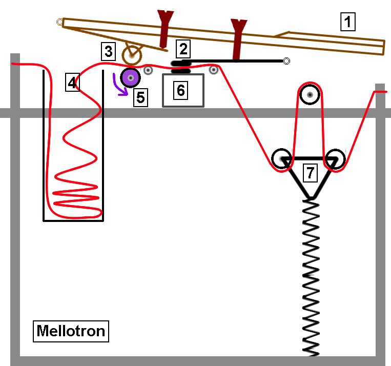 Schéma de fonctionnement du mellotron : touche enfoncée.